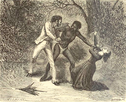 a